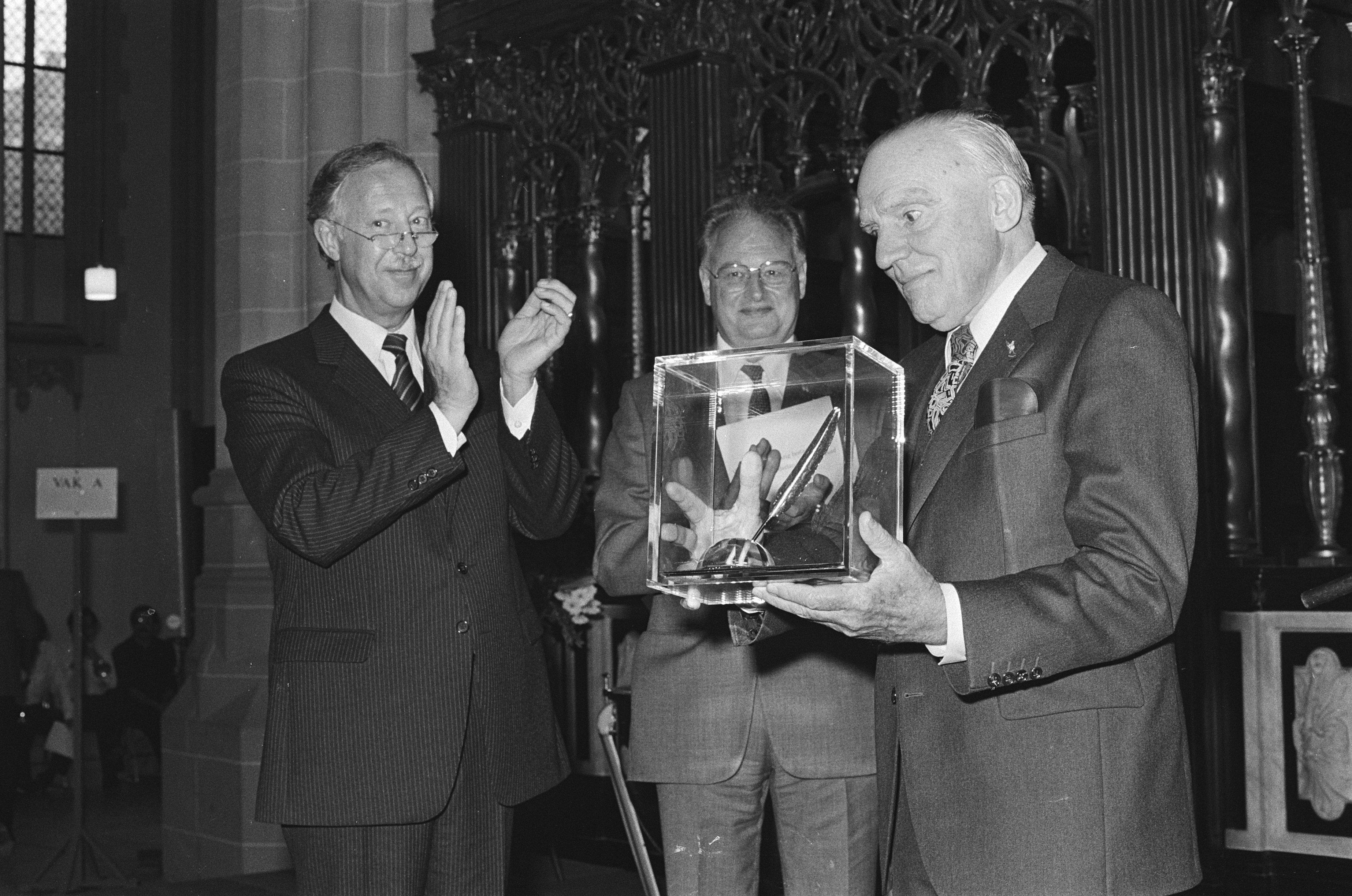 In Nieuwe Kerk, Adam gouden ganzeveer uitgereikt aan Prof. H. de la Fontaine Verwey, emeritus hoogleraar in wetenschap van het boek en bibliografie aan de Univ. van Amsterdam: v.l.n.r. dr. J.F. Remarque (voorz. Kon. Ned. Uitgeversbond), prof. dr. H.D.L. Vervliet, prof. mr De la Fontaine